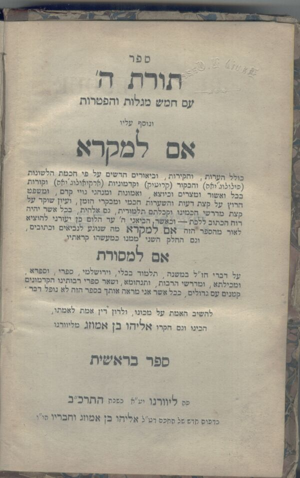 ספרו של הרב בן אמוזג שהודפס ב-1862